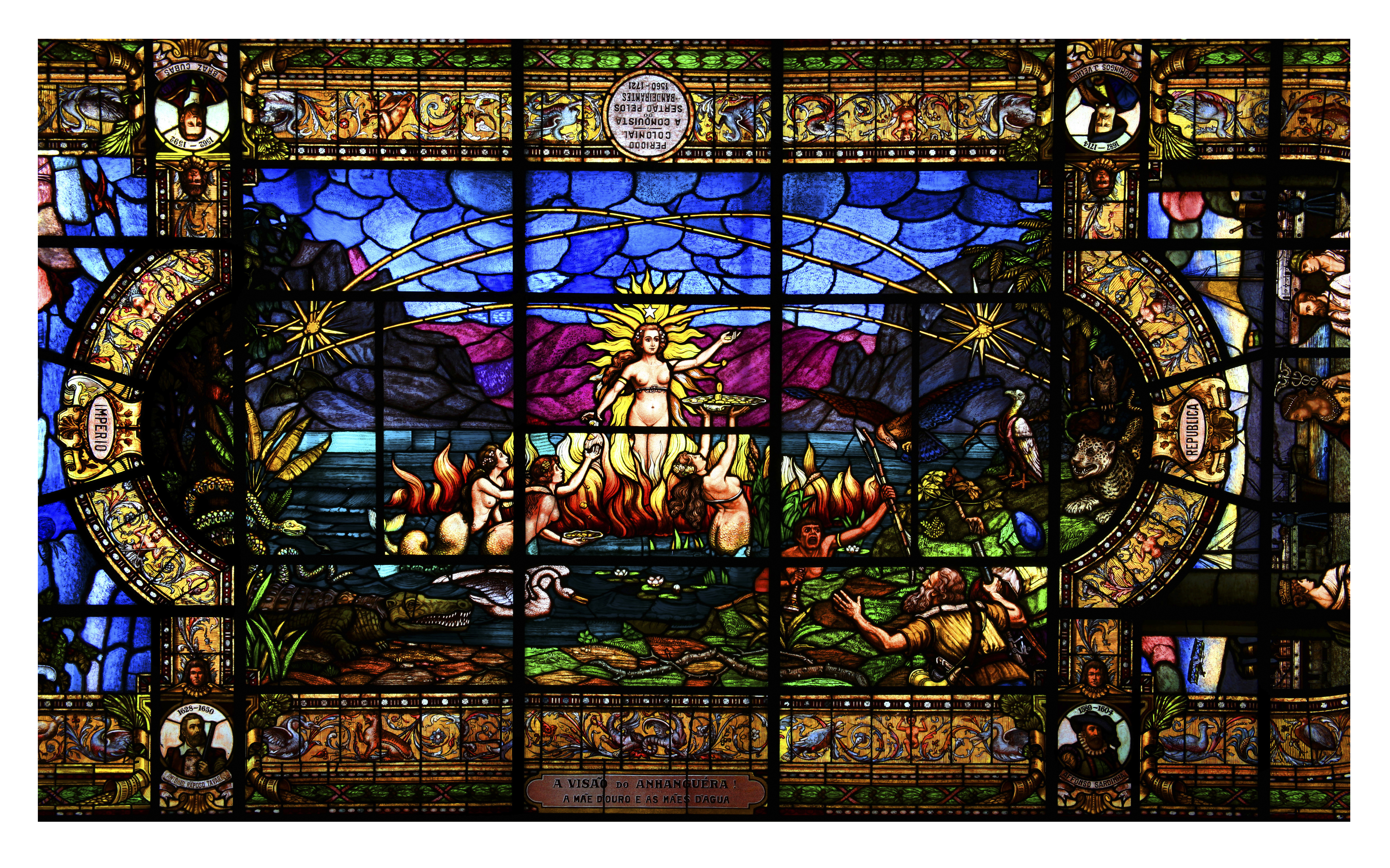 Vitral "A visão de Anhanguera", de Benedicto Calixto. O vitral fica no teto do grande salão, da Bolsa do Café, onde abriga atualmente o Museu do Café.